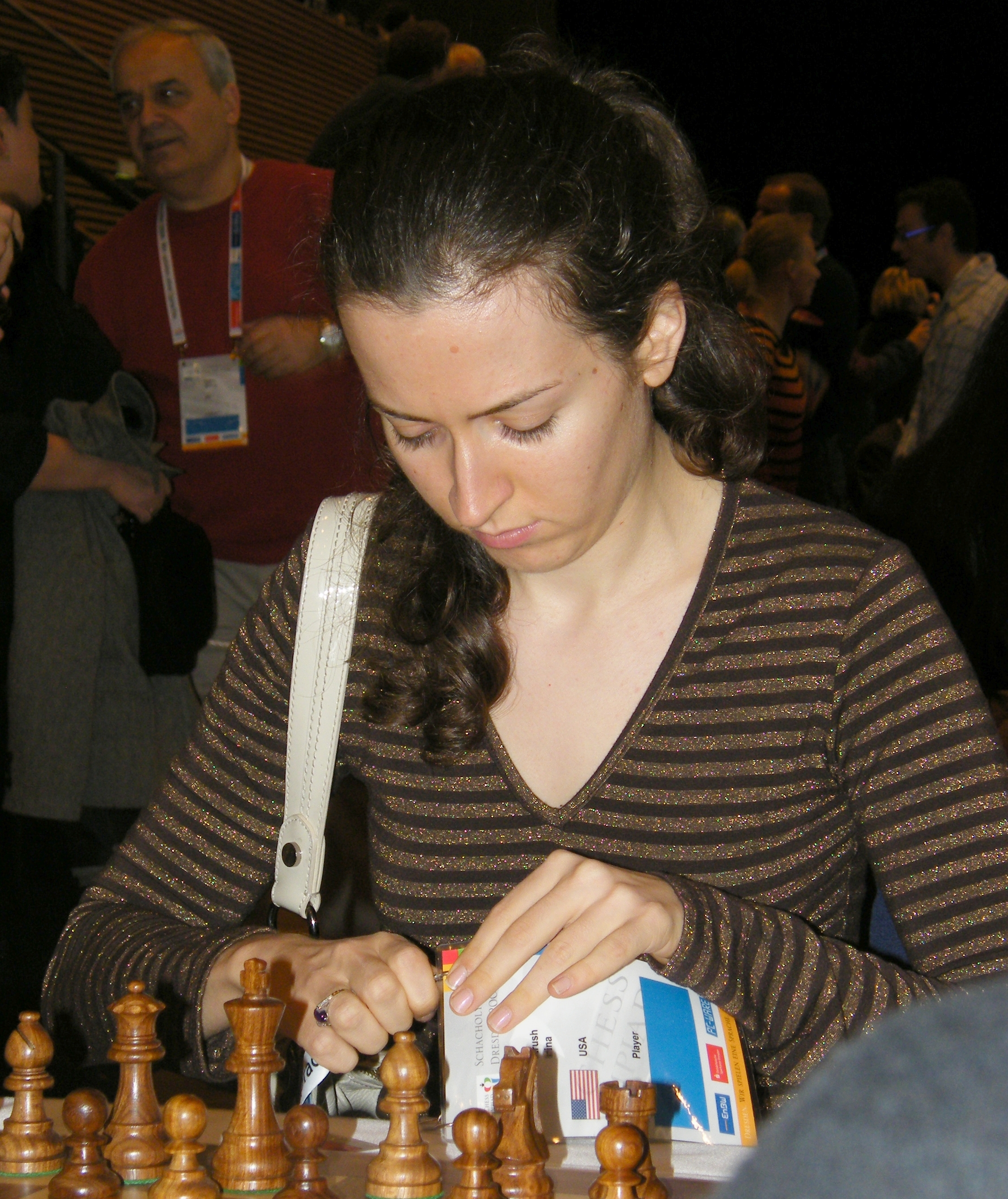 Irina Krush bei der 38. Schacholympiade in Dresden 2008